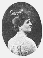 Maria José de Bragança, filha de Miguel I de Portugal.